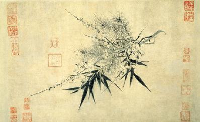 Sui Han San You Tu (歲寒三友圖) by Zhao Mengjian (趙孟堅), Song Dynasty